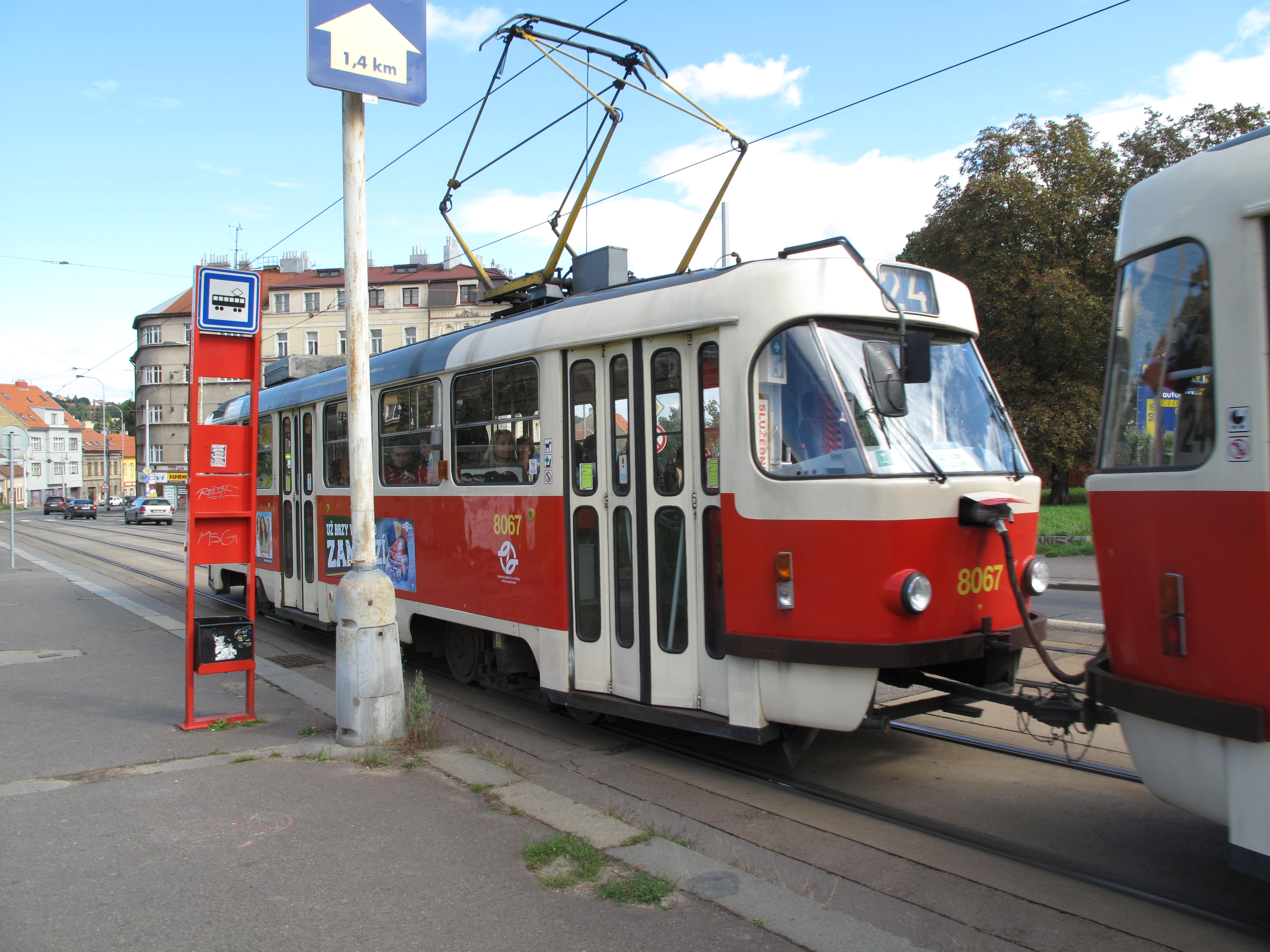 Tatra T3M v Praze